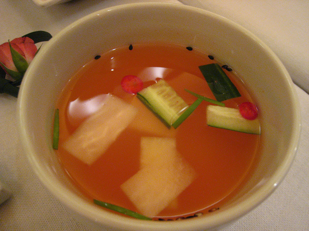 Nabak kimchi (나박김치), a variety of kimchi